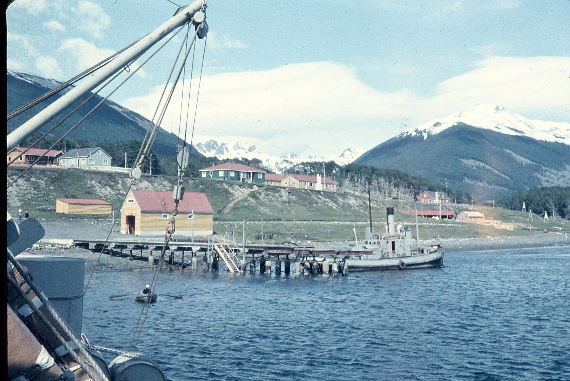 Muelle de Puerto Williams en noviembre de 1957. Isla Navarino